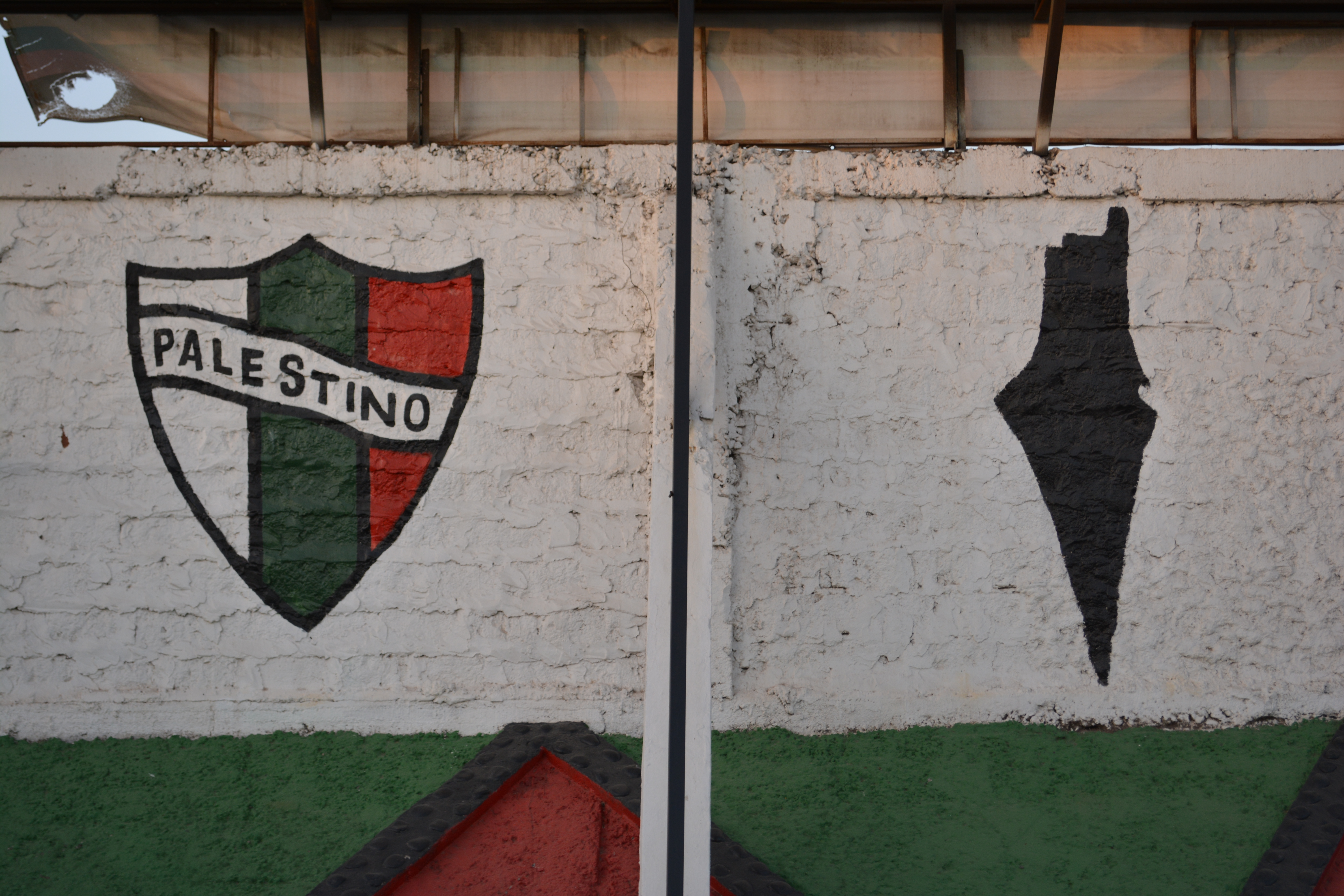 Palestino - Iquique, 26-02-2016, Estadio Municipal de La Cisterna, Santiago, Chile